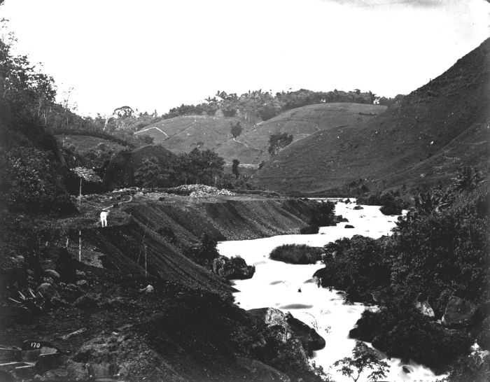 Foto. Album beslaat souvenir foto's van Java. Rivierovergang aan de grote Postweg in de Preanger regentschappen